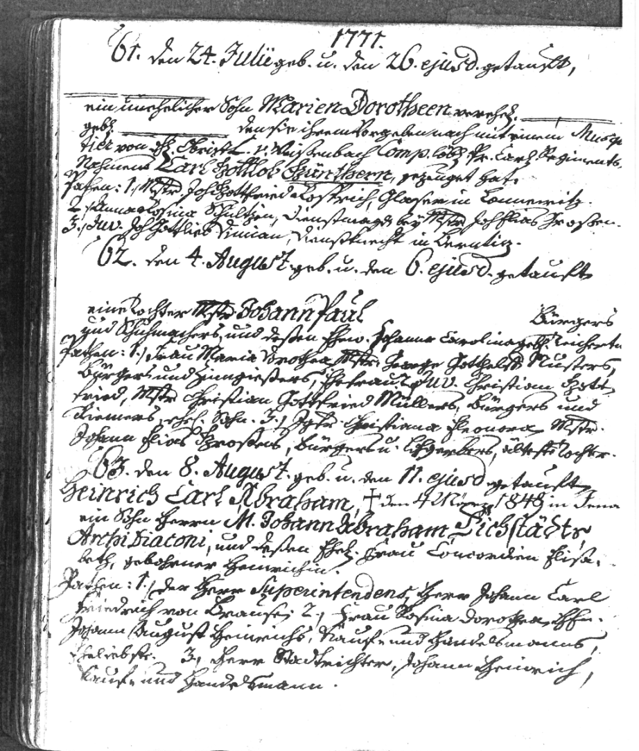 Kirchbucheintrag Oschatz 1771 Geburts- und Taufeintrag von Heinrich Karl Abraham Eichstädt